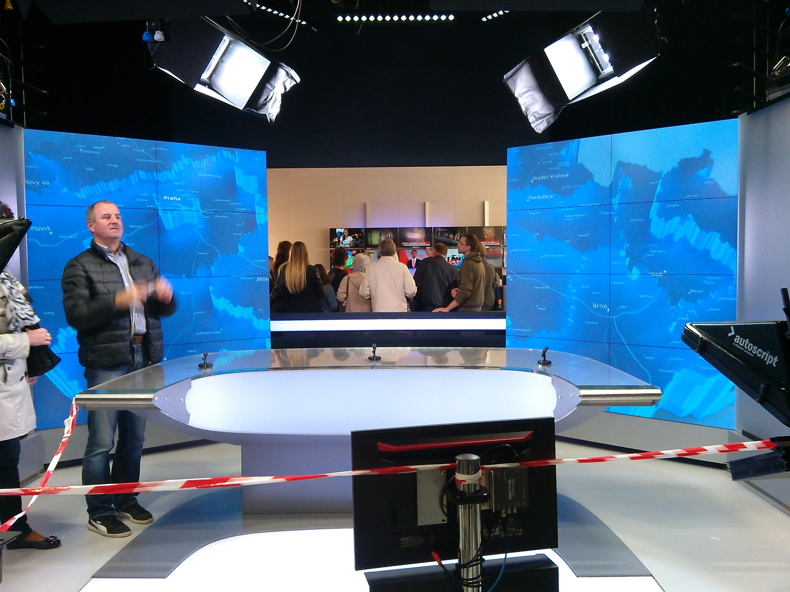 Pohled na zpravodajské studio v brněnském studiu České televize v říjnu 2016.